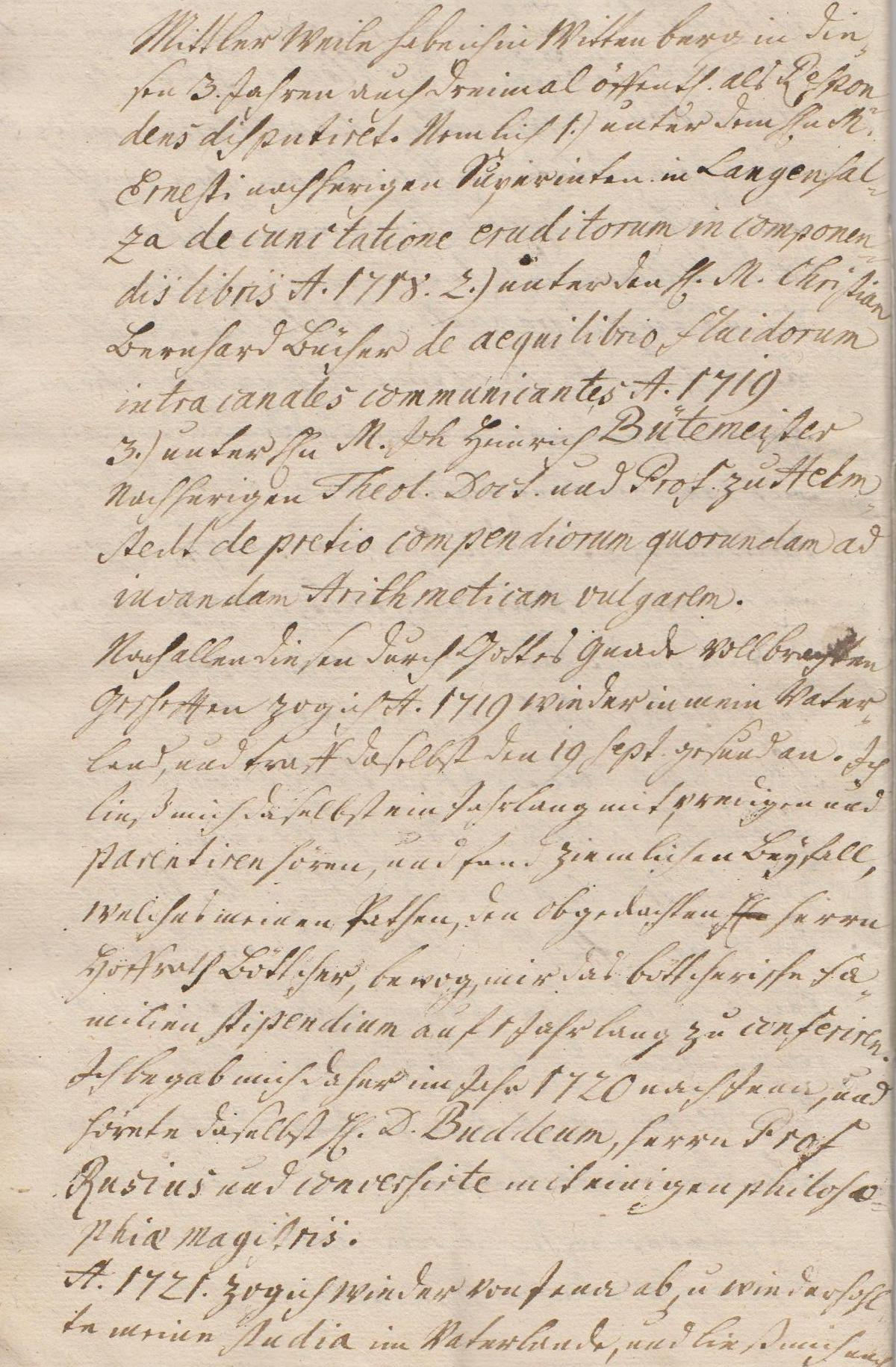 Seite 6 der Leichenpredigt für den Pastor August Wilhelm Reinhart (1696/1770), Bürger der Stadt Heringen an der Helme.